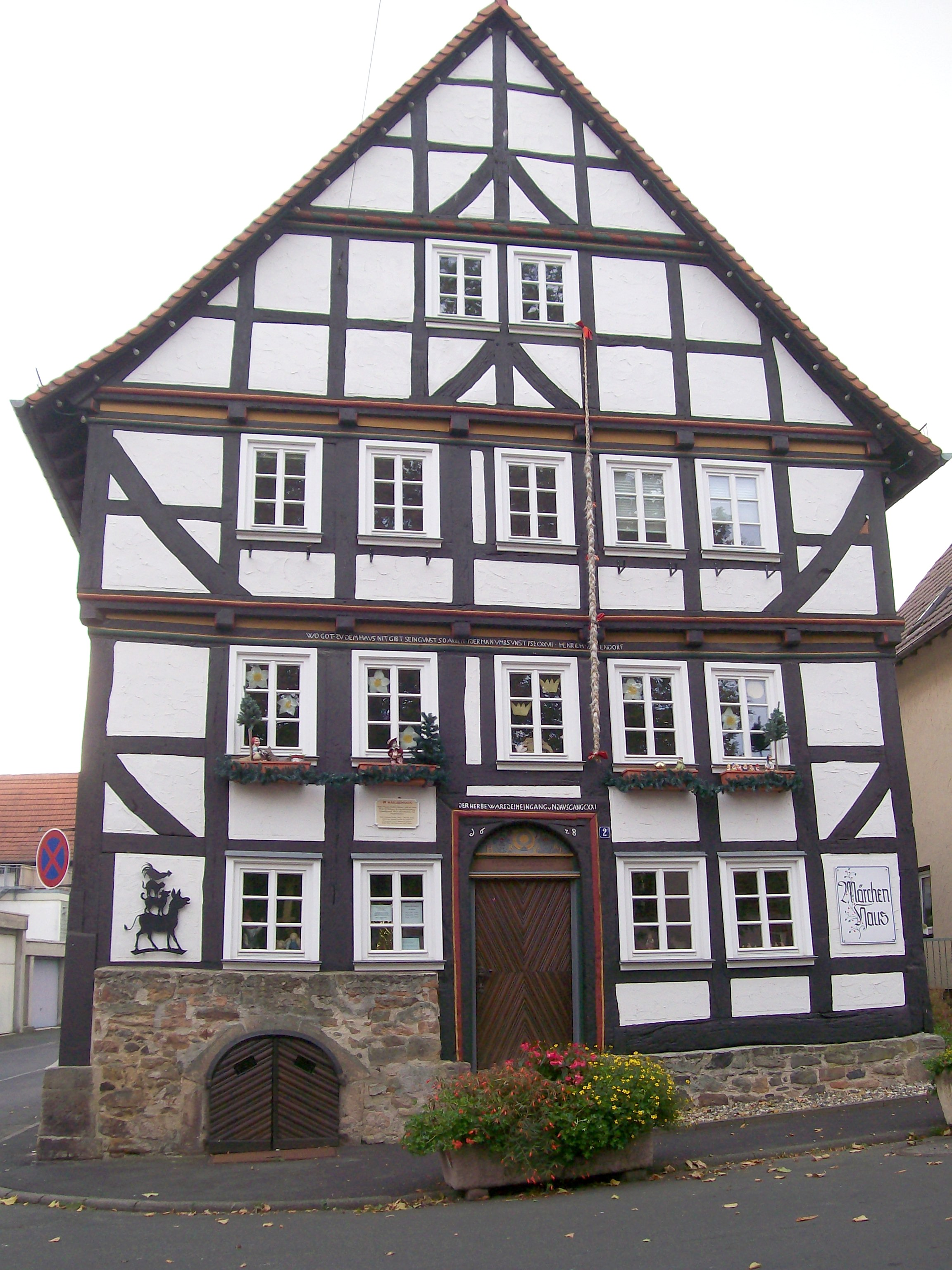 Alsfelder Märchenhaus mit Puppenstuben-Etage.